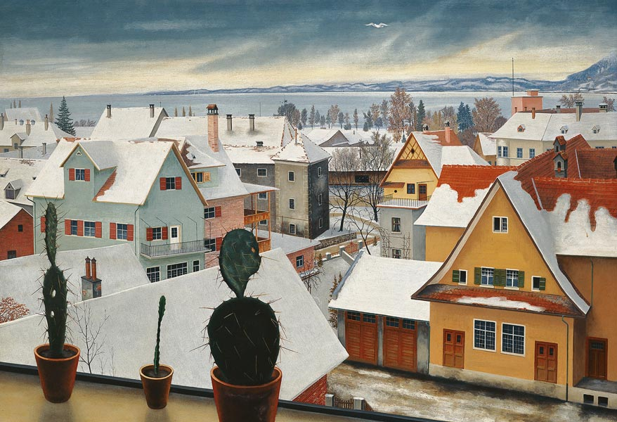 Rudolf Wacker: „Winterlandschaft“, Privatbesitz